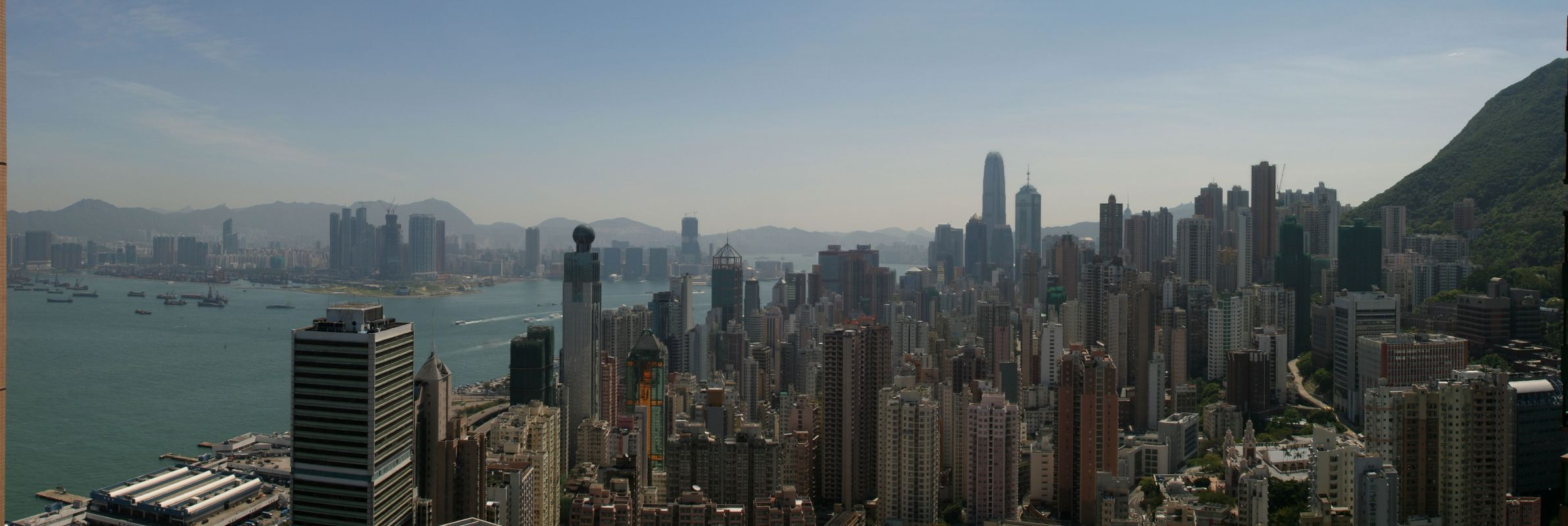 Panorama de Hong-Kong depuis The Belcher's